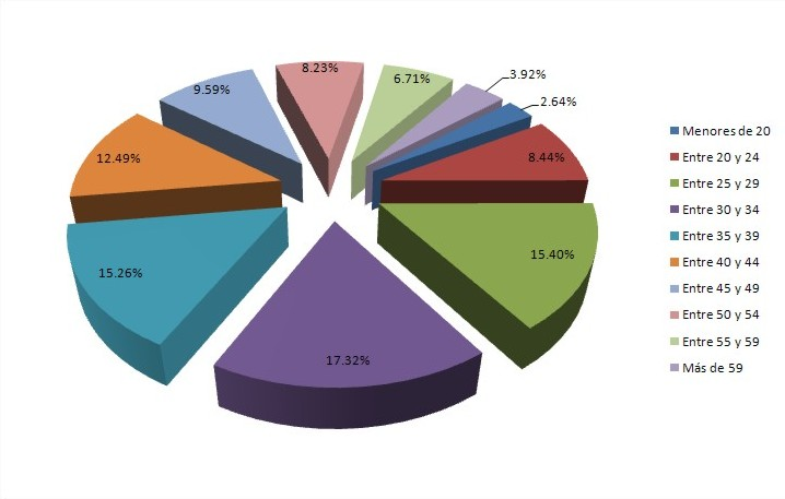 Distribución del paro en Toledo (España) por grupos de edad a 31/01/2012